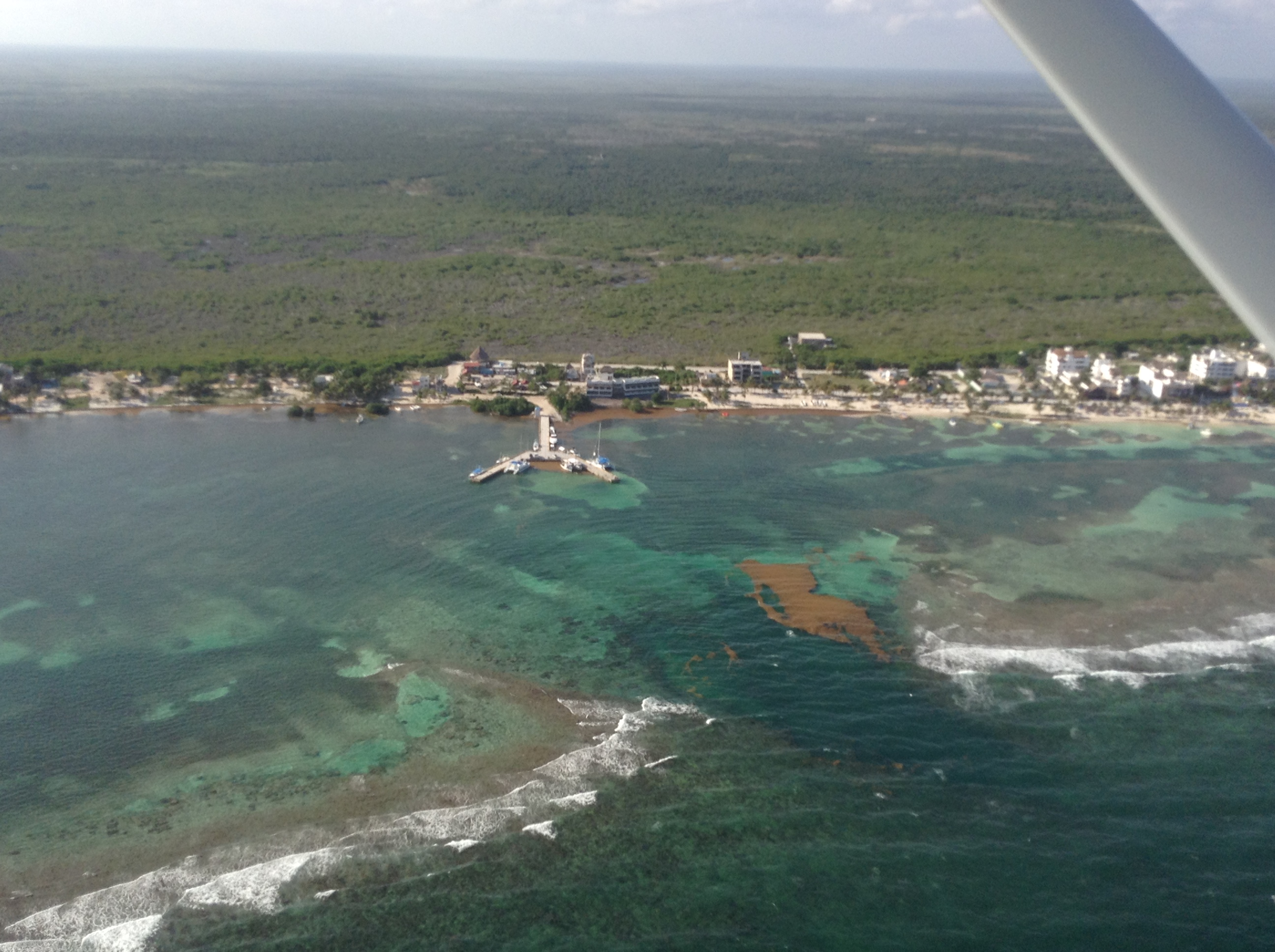 Calle Mojarra, Mahahual, Q.R., Mexico